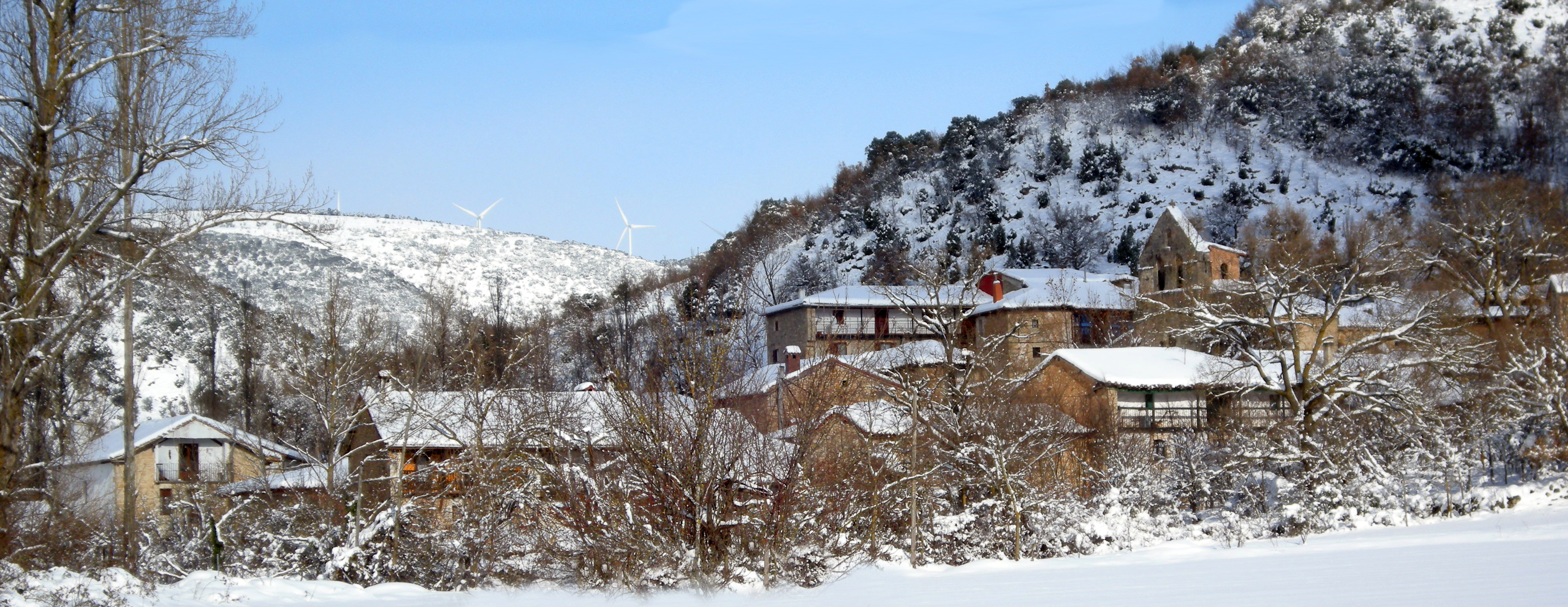 Manzanedo